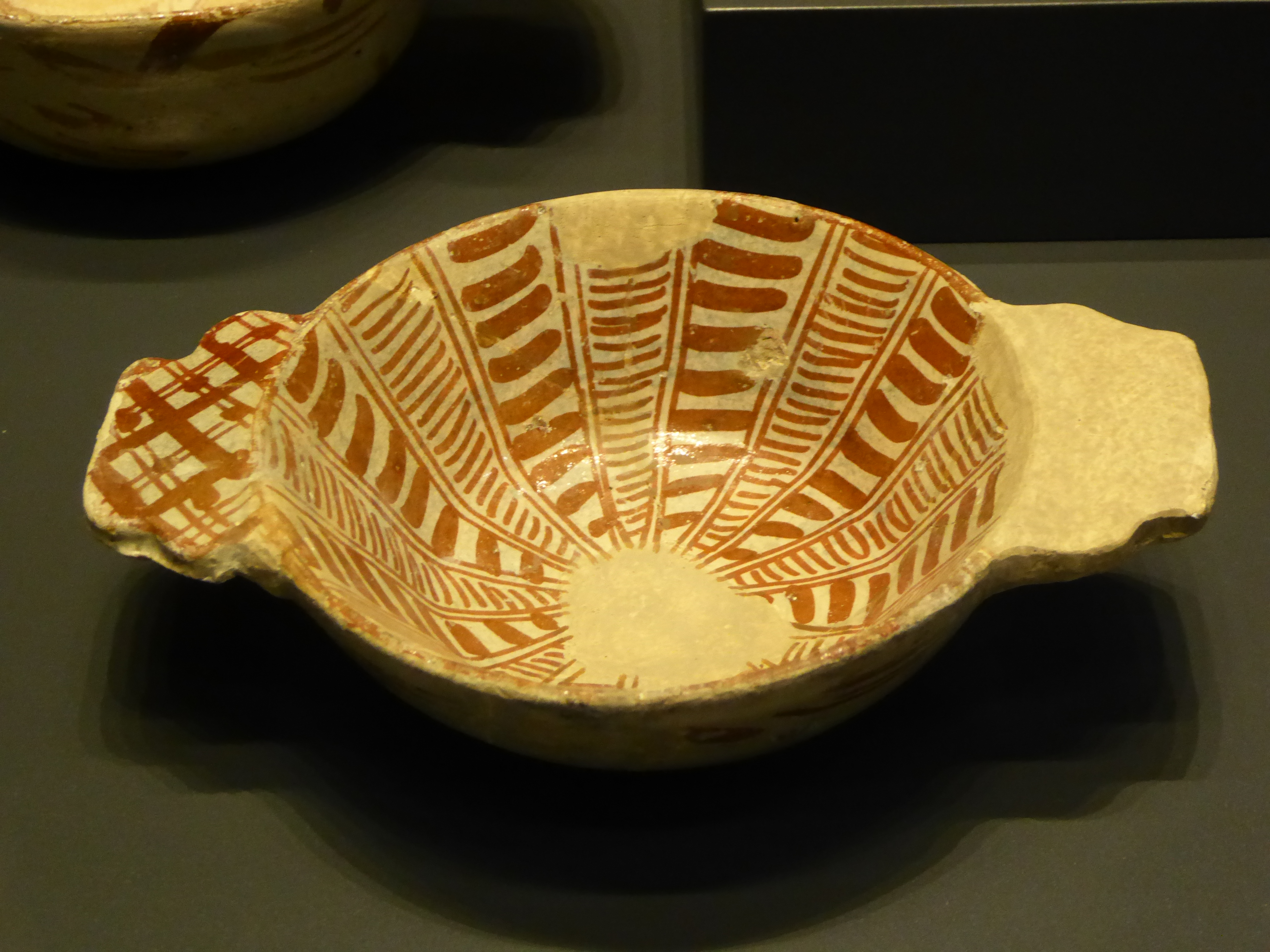 Escudilla con asas de orejeta de los talleres de Muel. Cerámica vidriada con decoración en reflejo metálico. Del segundo tercio del siglo XVI - 1610.